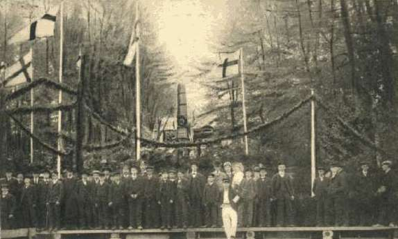 Minne från Linnéfesten i Råshult den 21 maj 1907